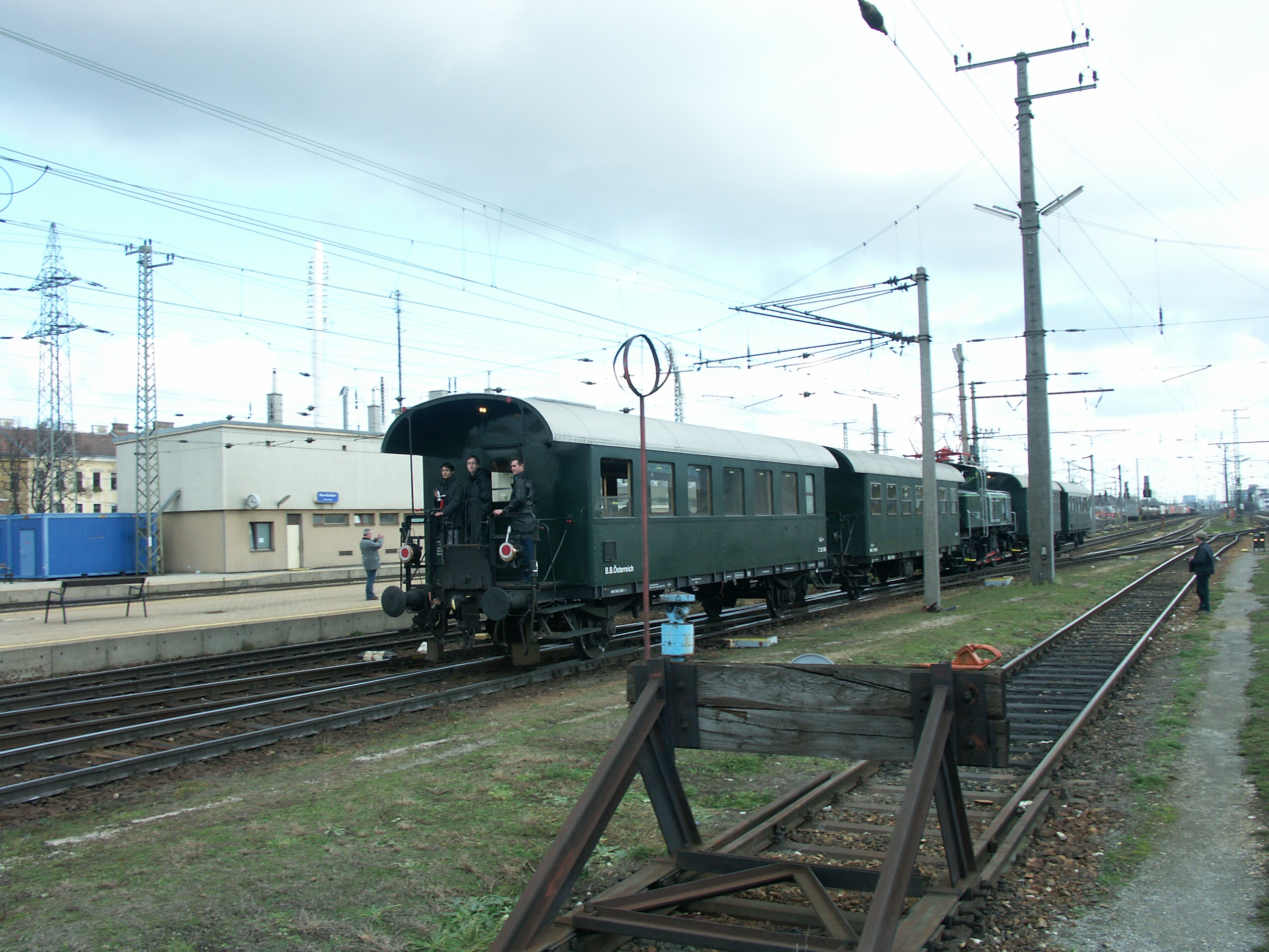 „Purkersdorfer Pendler“, Sonderzug zwischen Wien Hütteldorf und Heiligenstadt, Anlass war das 20jährige Bestehen des Schnellbahnbetriebes auf der Vorortelinie; 8. Dezember 2007